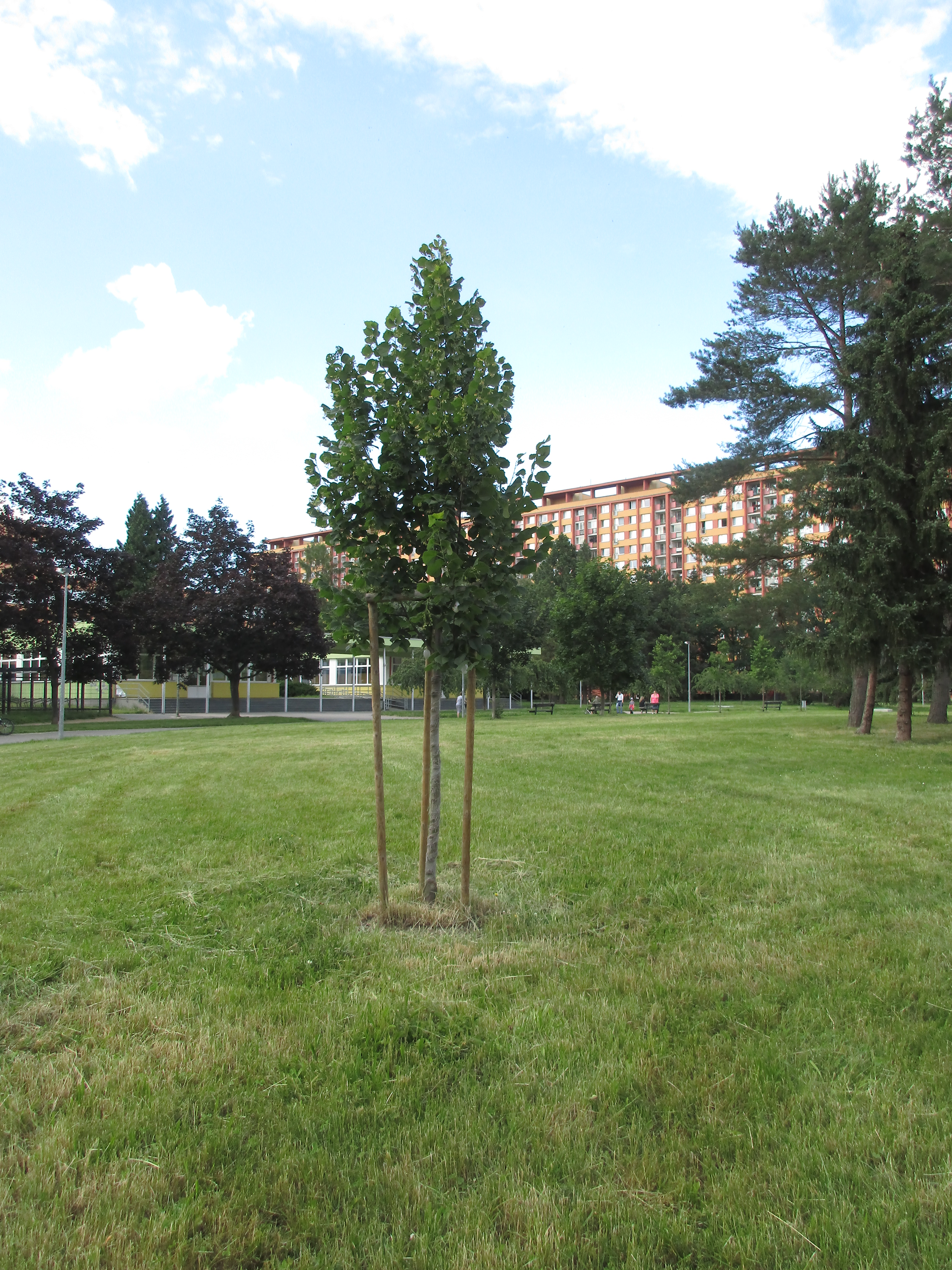 Lípa svobody. Praha 8 - Kobylisy, Sídliště Ďáblice, Taussigova. Vysazena roku 2018 na památku 100. výročí vzniku Československé republiky.